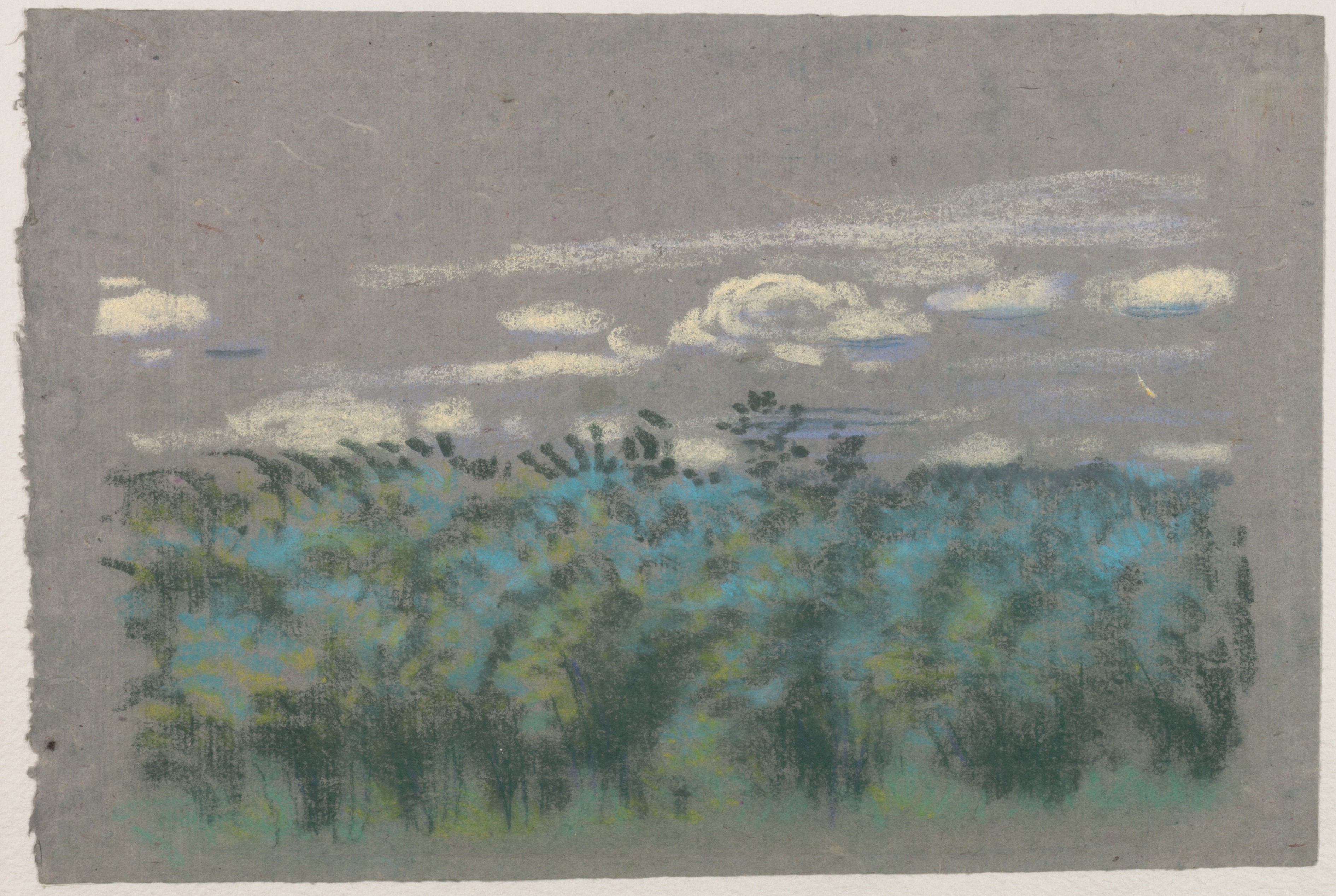 Drawing; Drawings